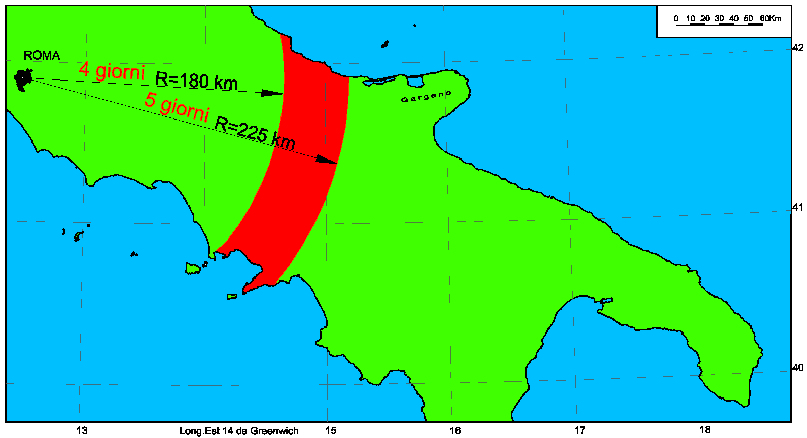 Il luogo della battaglia di Canne a 5 giorni di marcia da Roma.